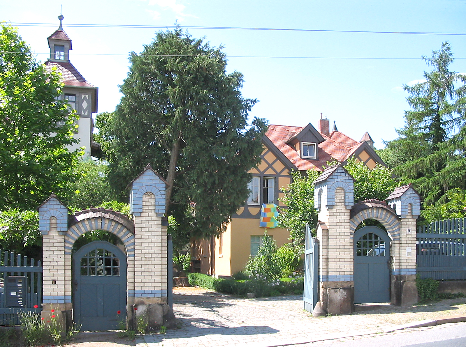 Radebeul, Villenkolonie Altfriedstein, Nebengebäude der Villa Oskar Möbius nebst Einfahrtstor